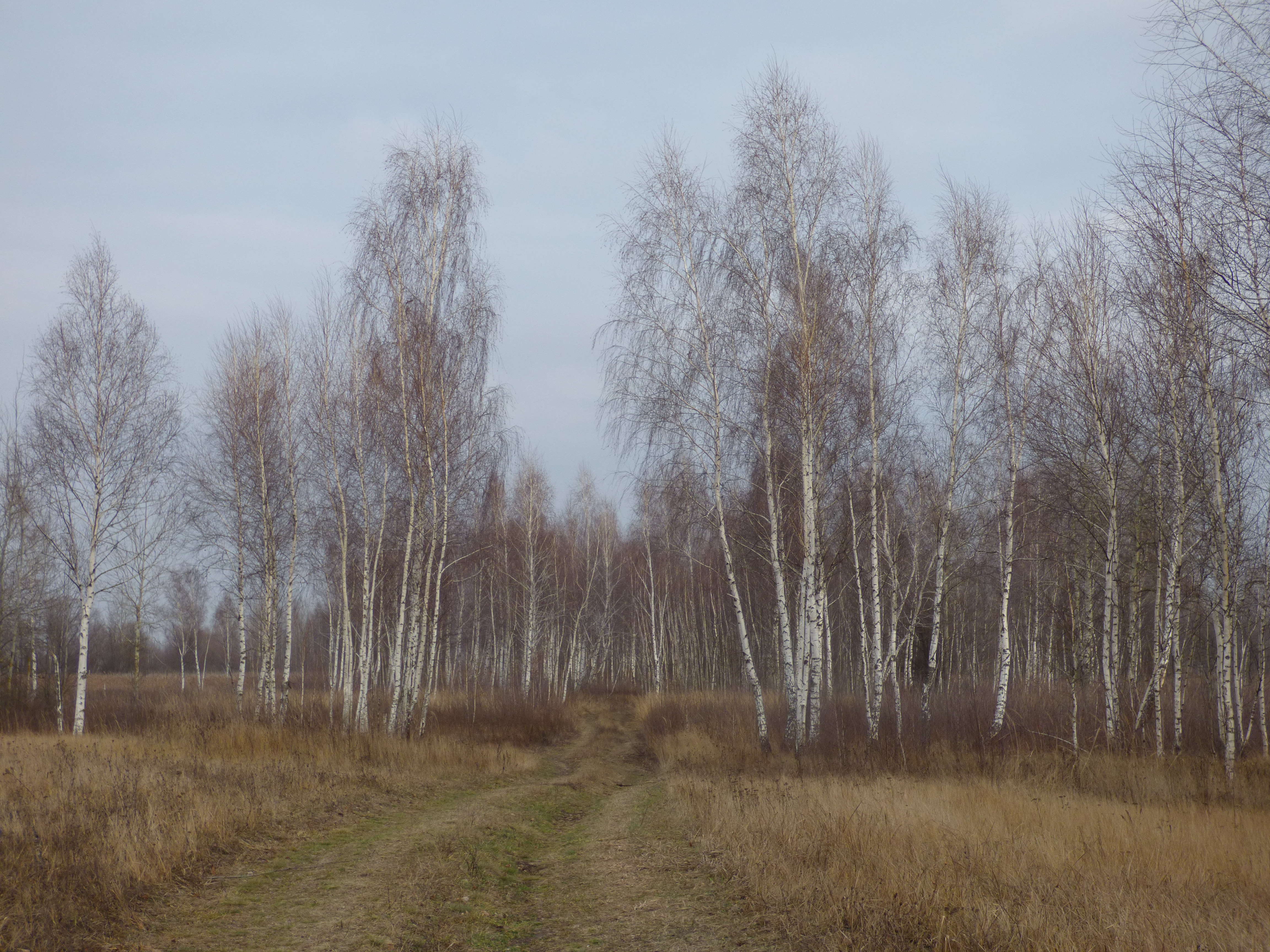 Колісниківський, Ніжинський район, с. Колісники